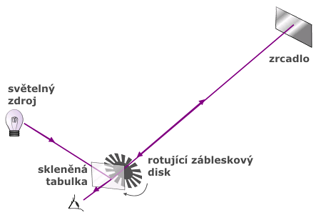 Fizeau-Foucaultův přístroj